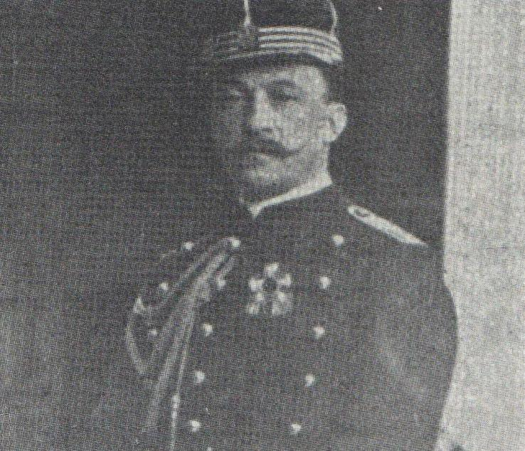 General Pablo Escandón y Barrón